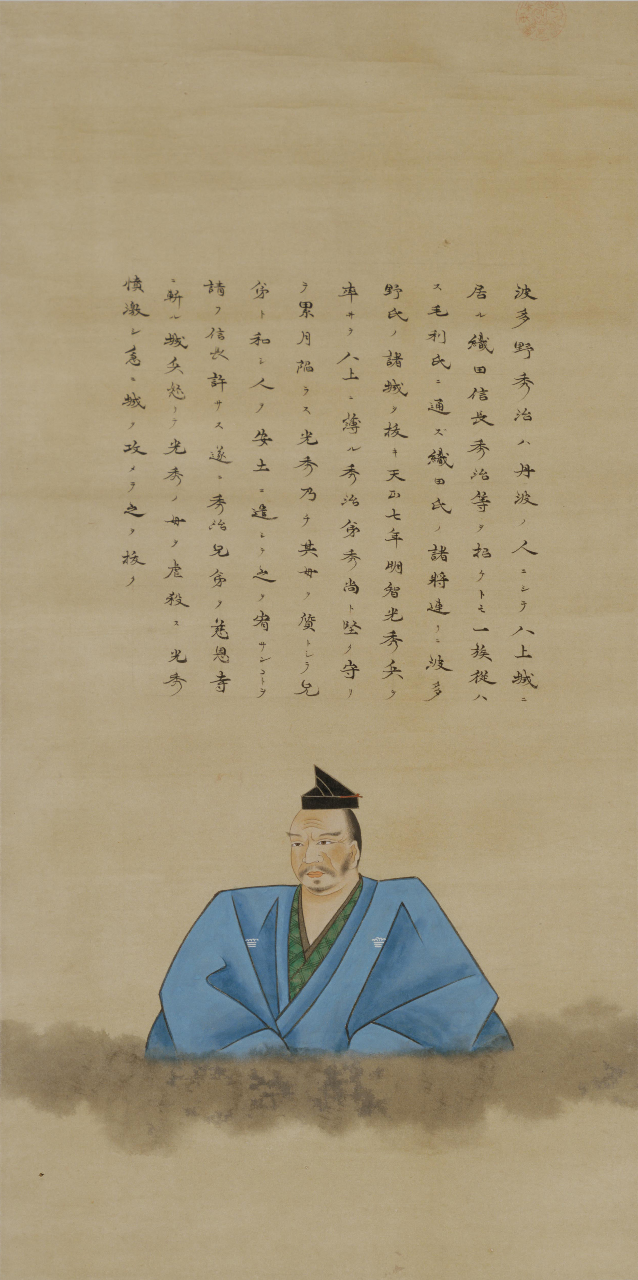 波多野秀治の肖像。